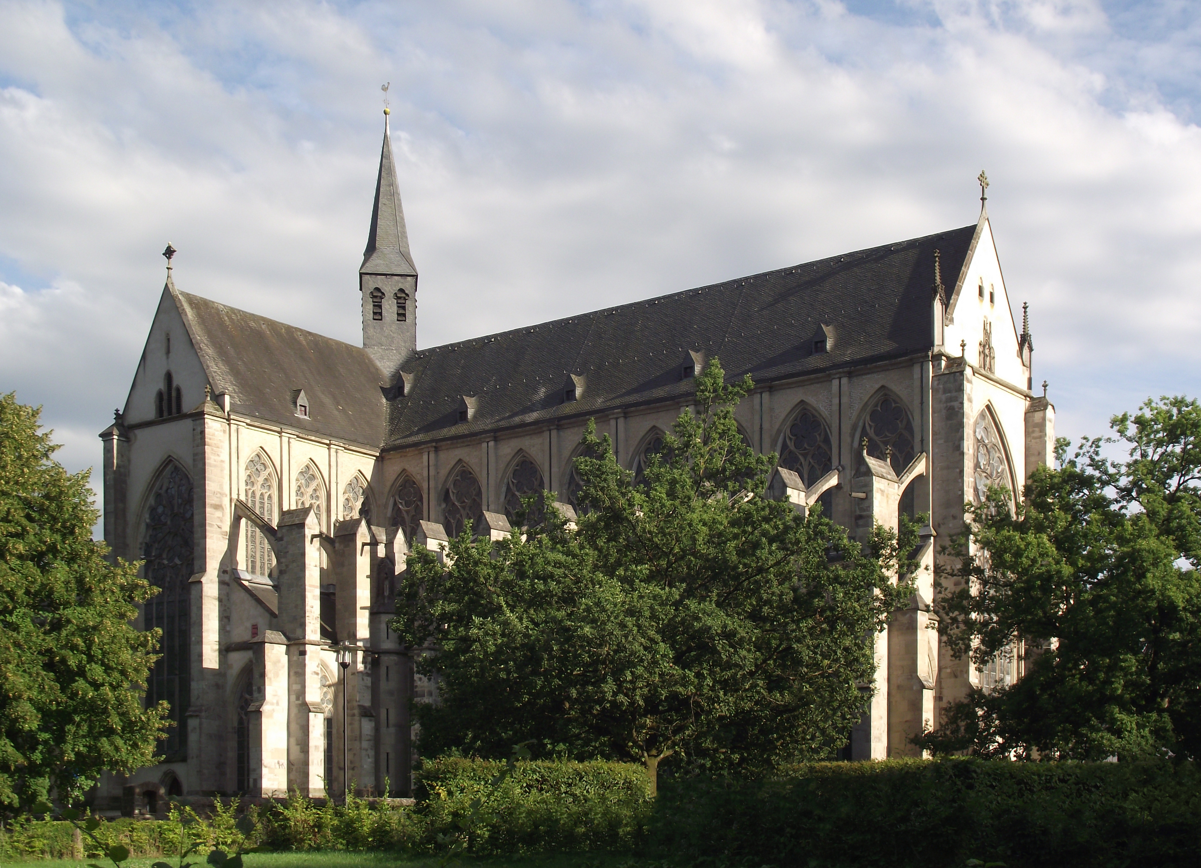 Altenberger Dom von der Markuskapelle aus fotografiert